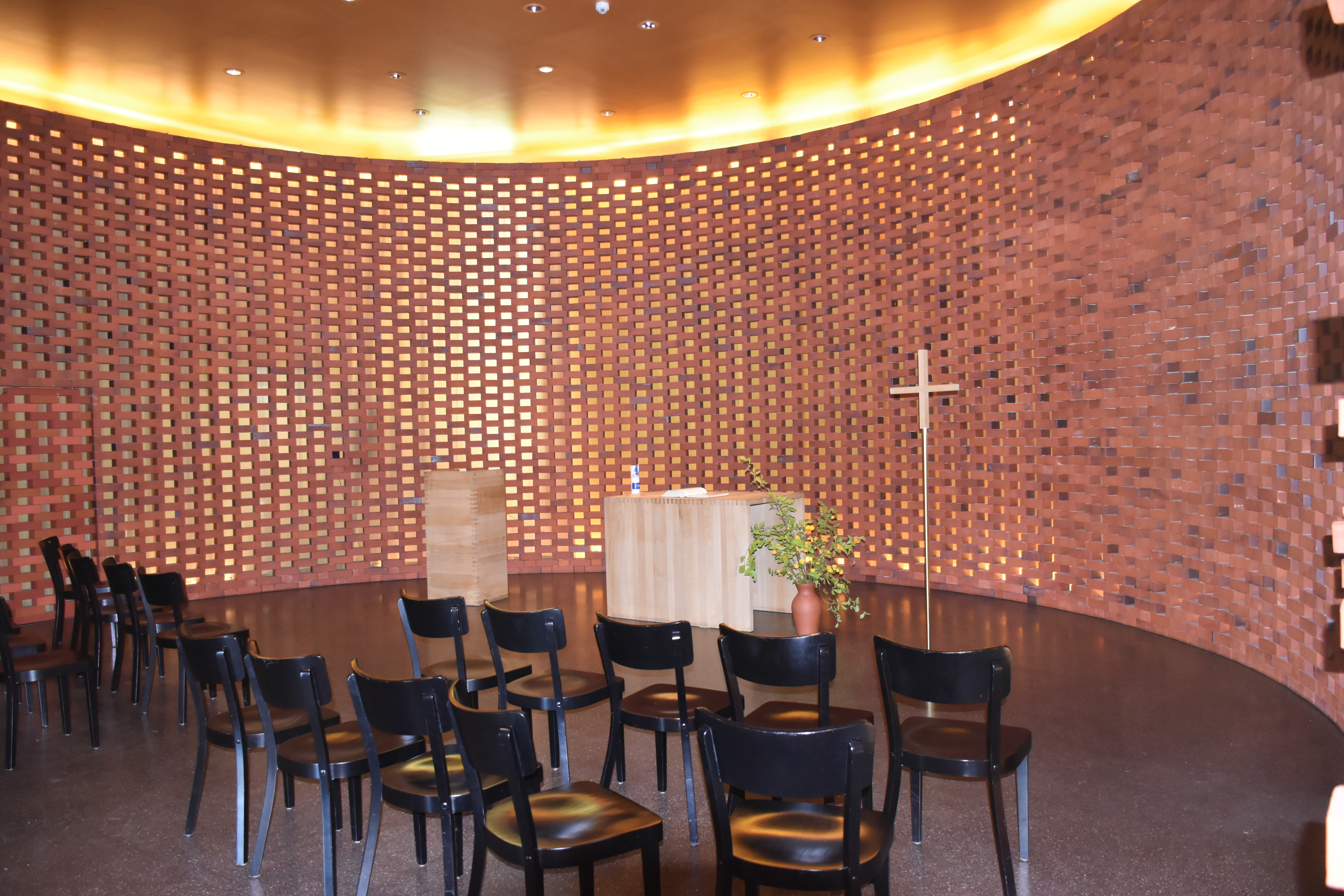 Ökumenisches Forum HafenCity - Kapelle